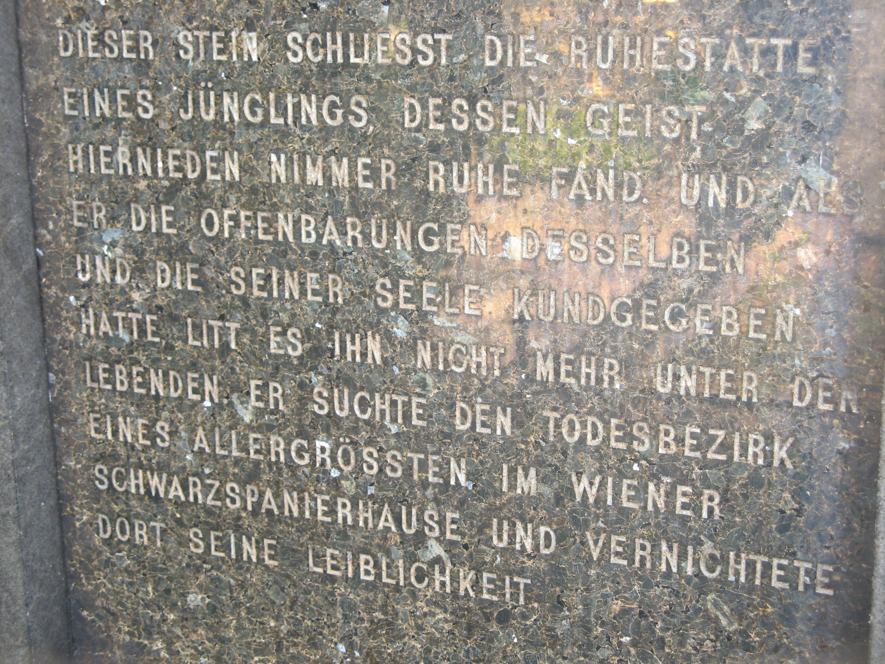 Inschrift des Grabes von Otto Weininger auf dem Evangelischen Friedhof Matzleinsdorf in Wien